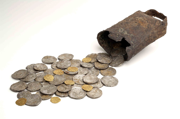 Tesoro de Gazteluberri (Edad Moderna). Número de inventario: Conjunto 233.